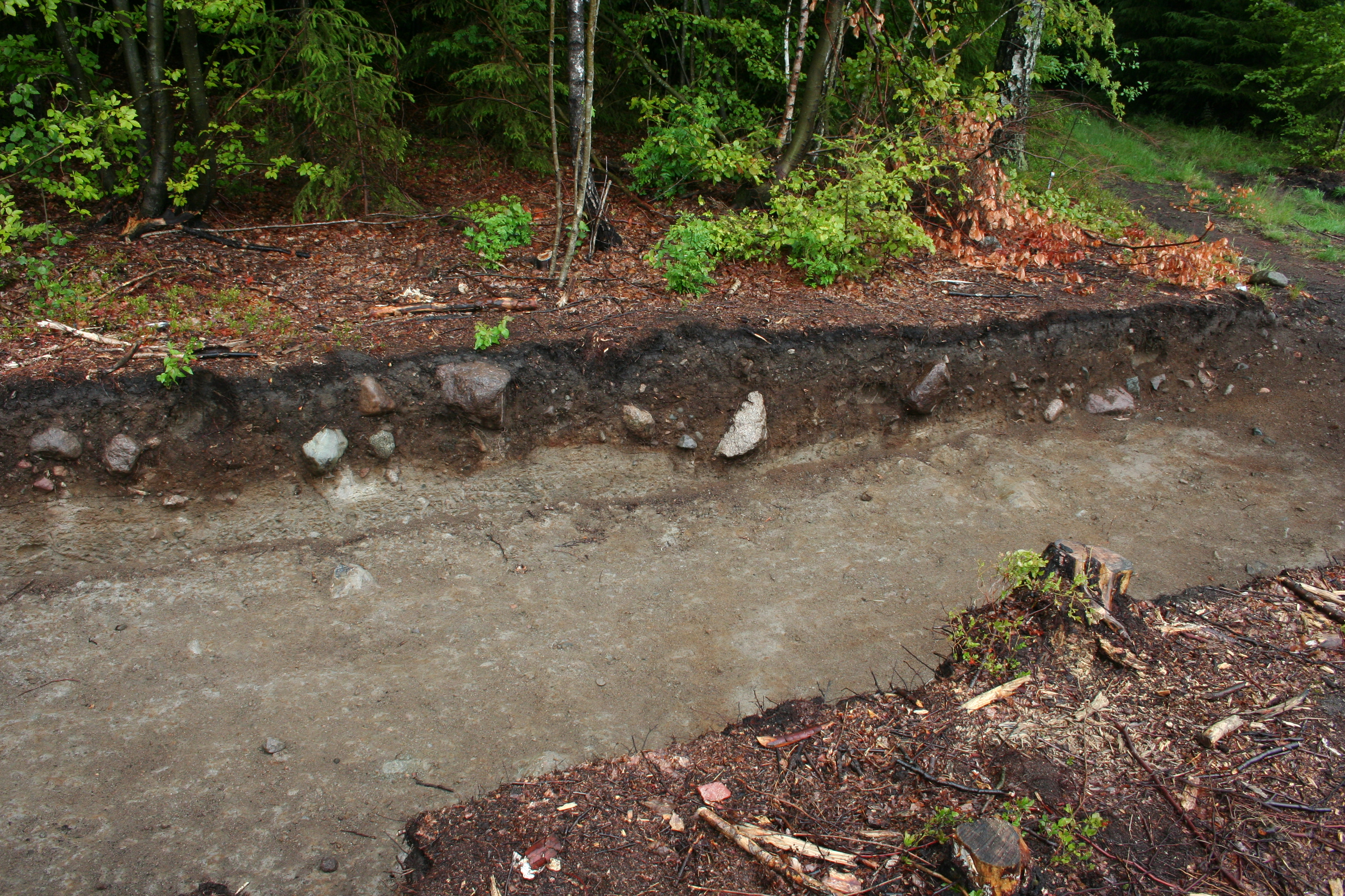 Dyrkingslag fra eldre jernalder, Hørdalsåsen, Sandefjord, Vestfold